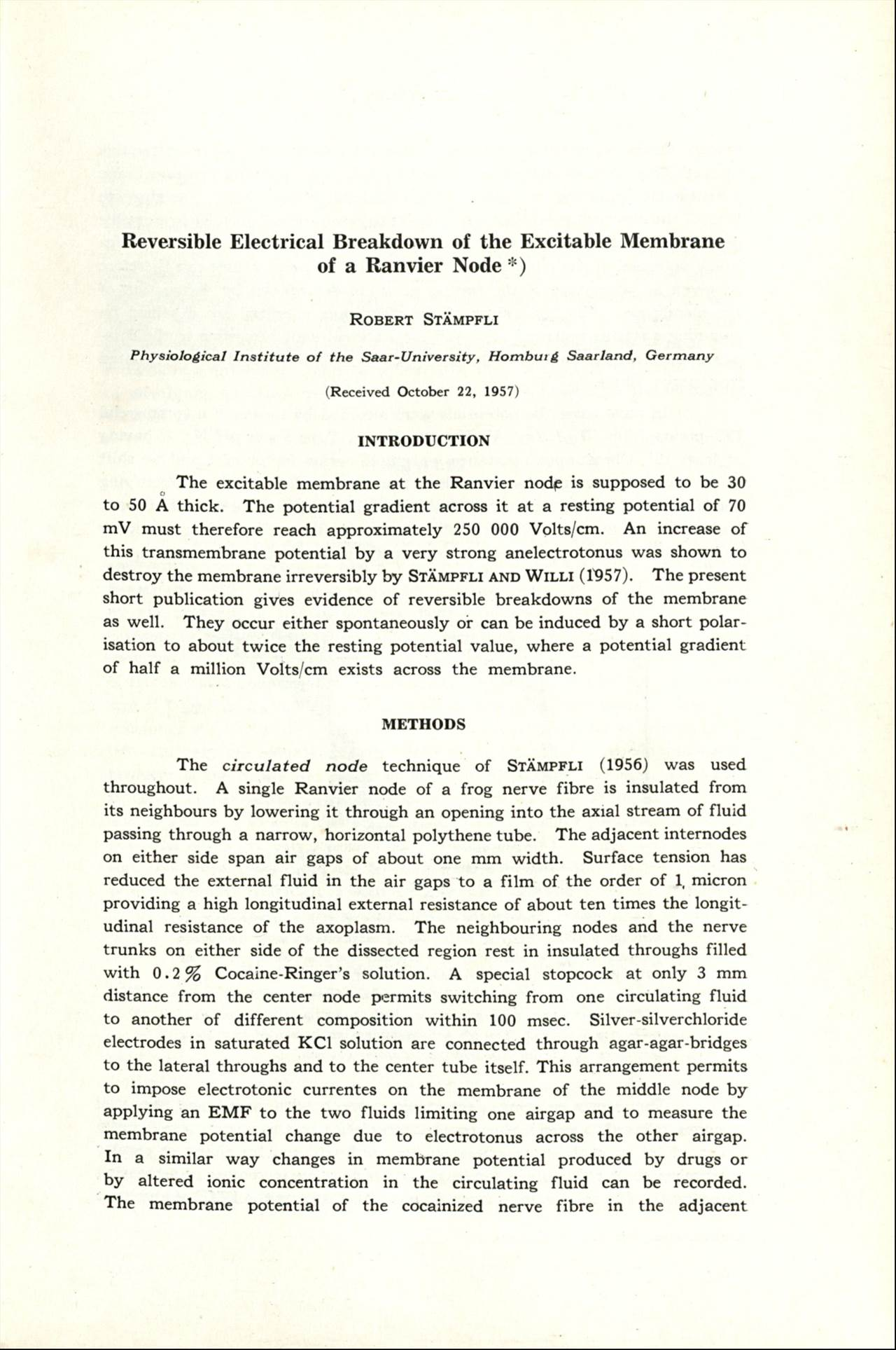 Primeira página do artigo publicado por Stampfli em 1958 nos AABC. É considerado o primeiro artigo no qual é descrito o fenômeno da Eletroporação.